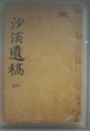 김장생의 사계 유고 표지